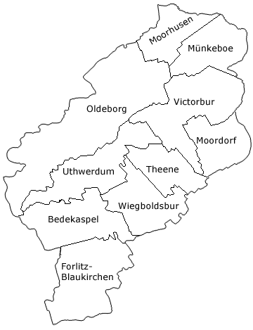 Darstellung der Ortsteile der Gemeinde Südbrookmerland (Ostfriesland) in Niedersachsen auf dem Stand von 2008 (unverändert seit 1972).